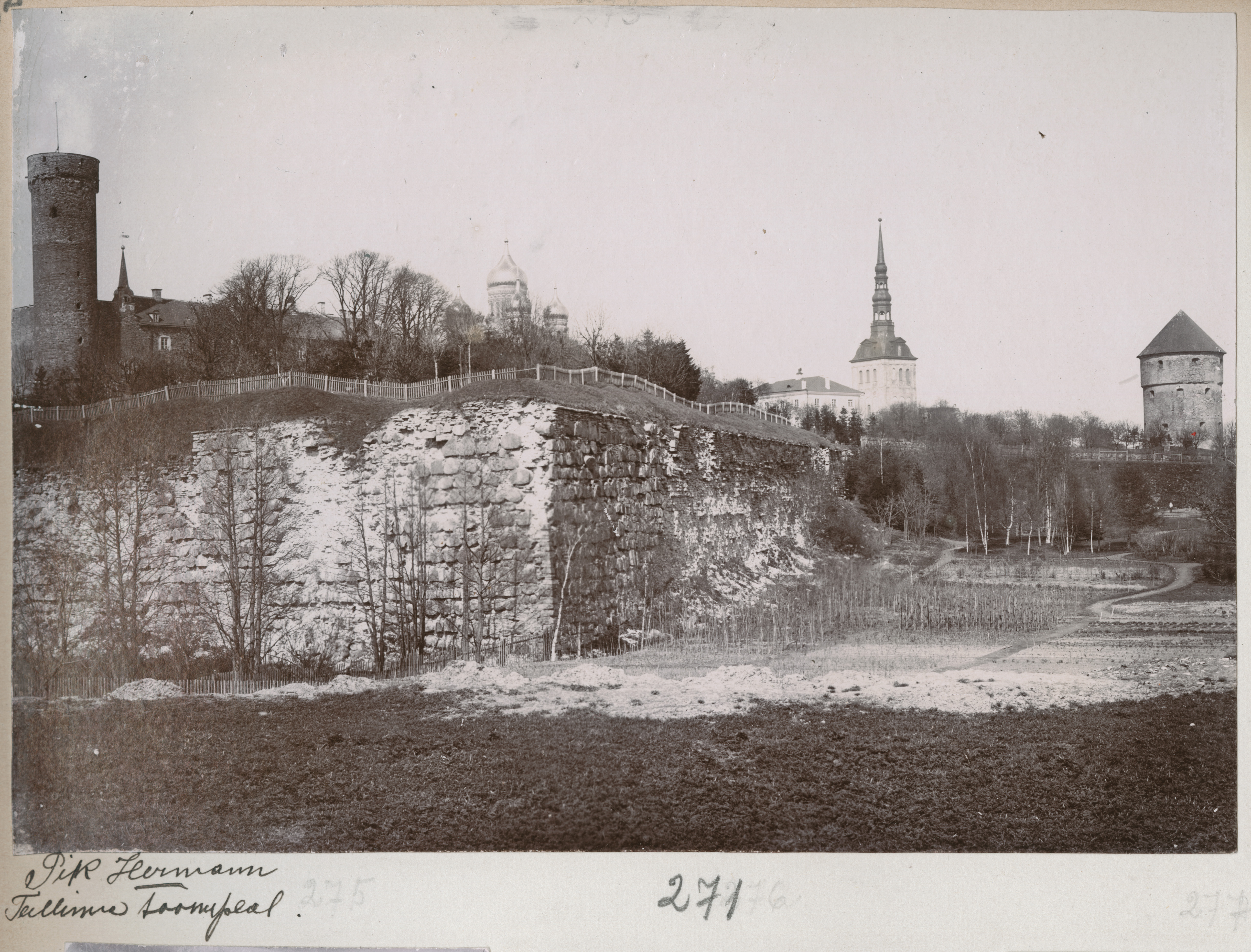 Toompea loss, ees Lindamäe bastion.